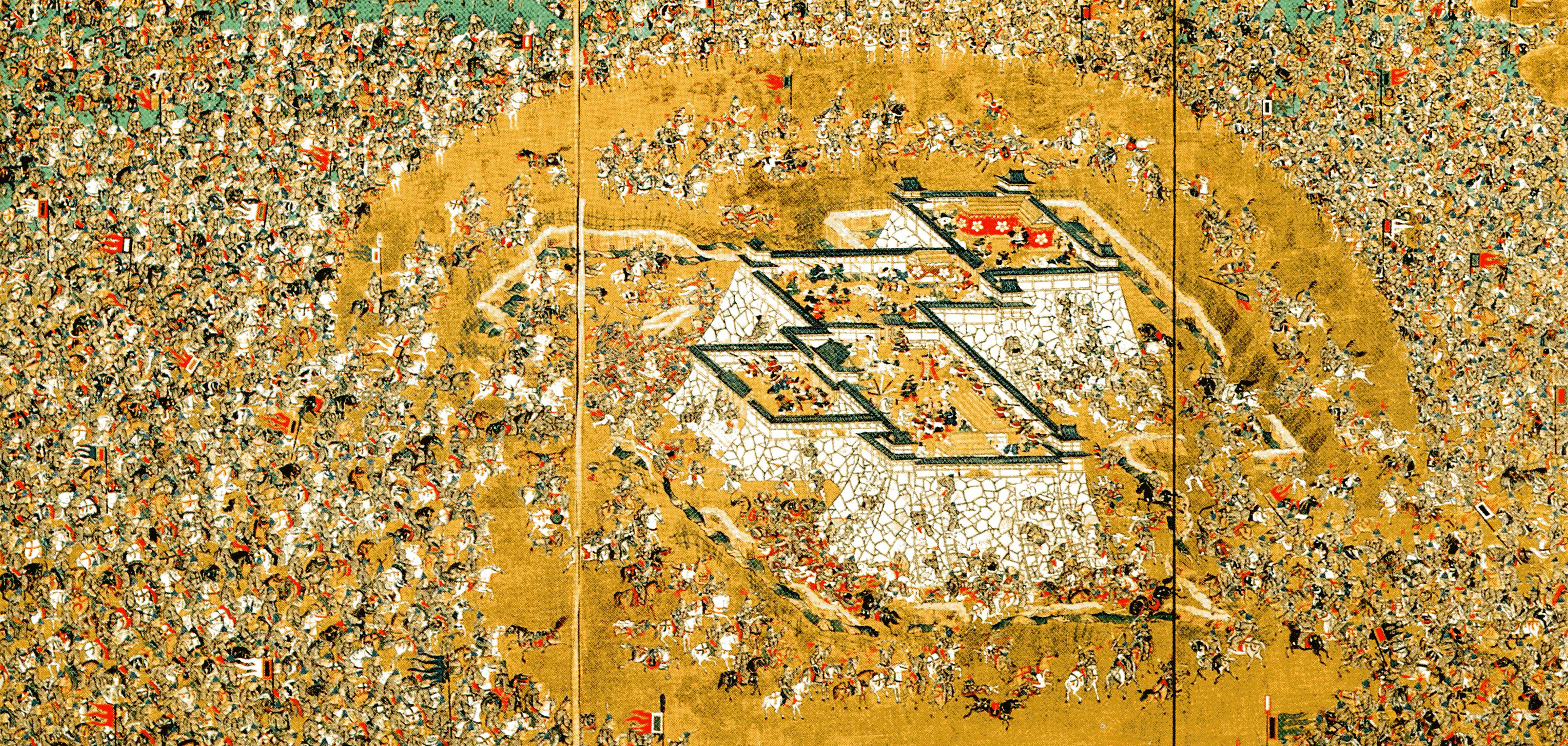 蔚山籠城図屏風（福岡市立博物館所蔵）